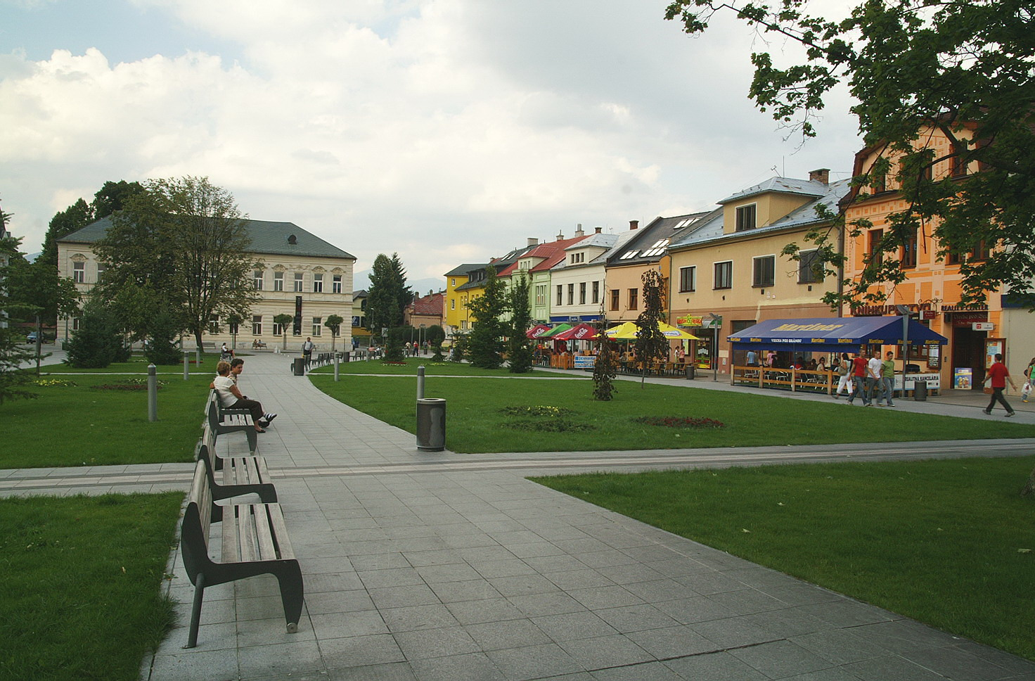 Martin (SVK) plaza